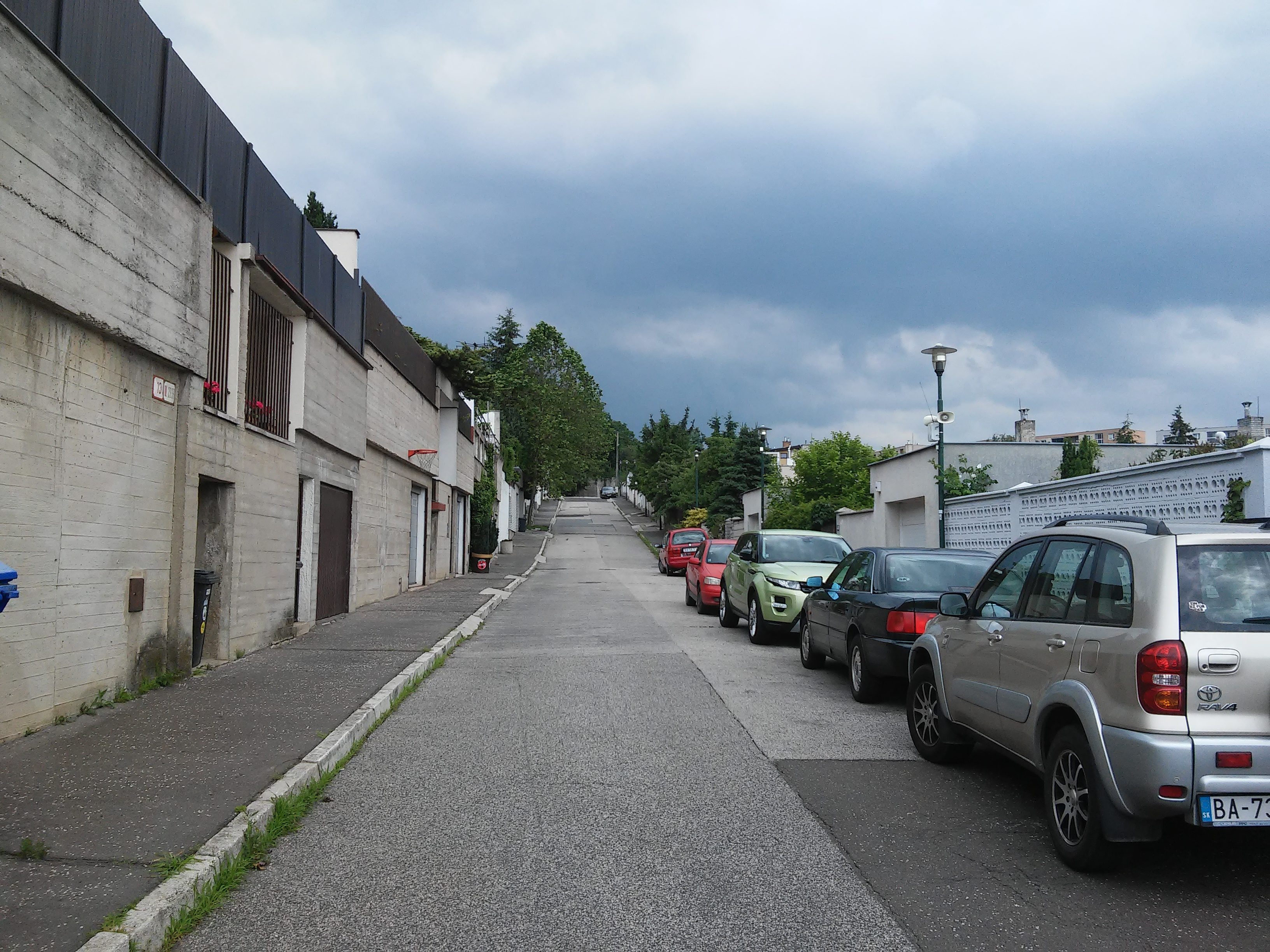 Stanekova, Lamač, Bratislava